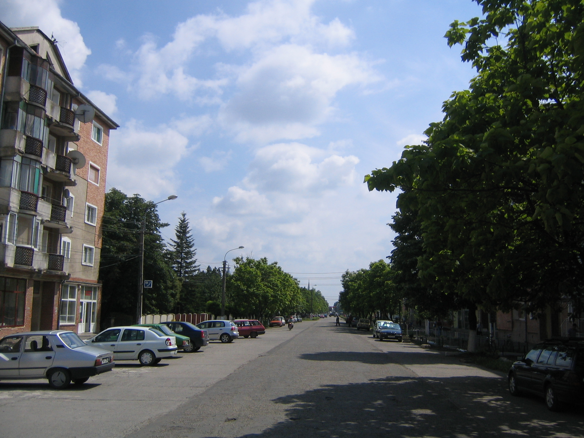 Strada in Jimbolia